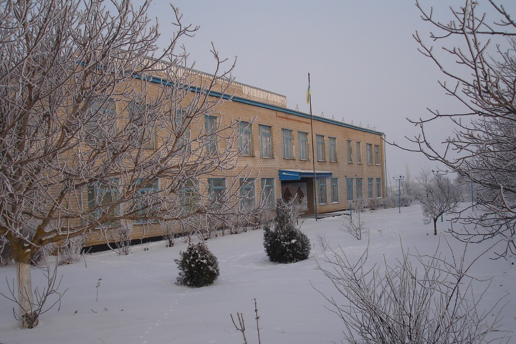 Фотографія школи села Іванівка Миколаївської області Миколаївського району